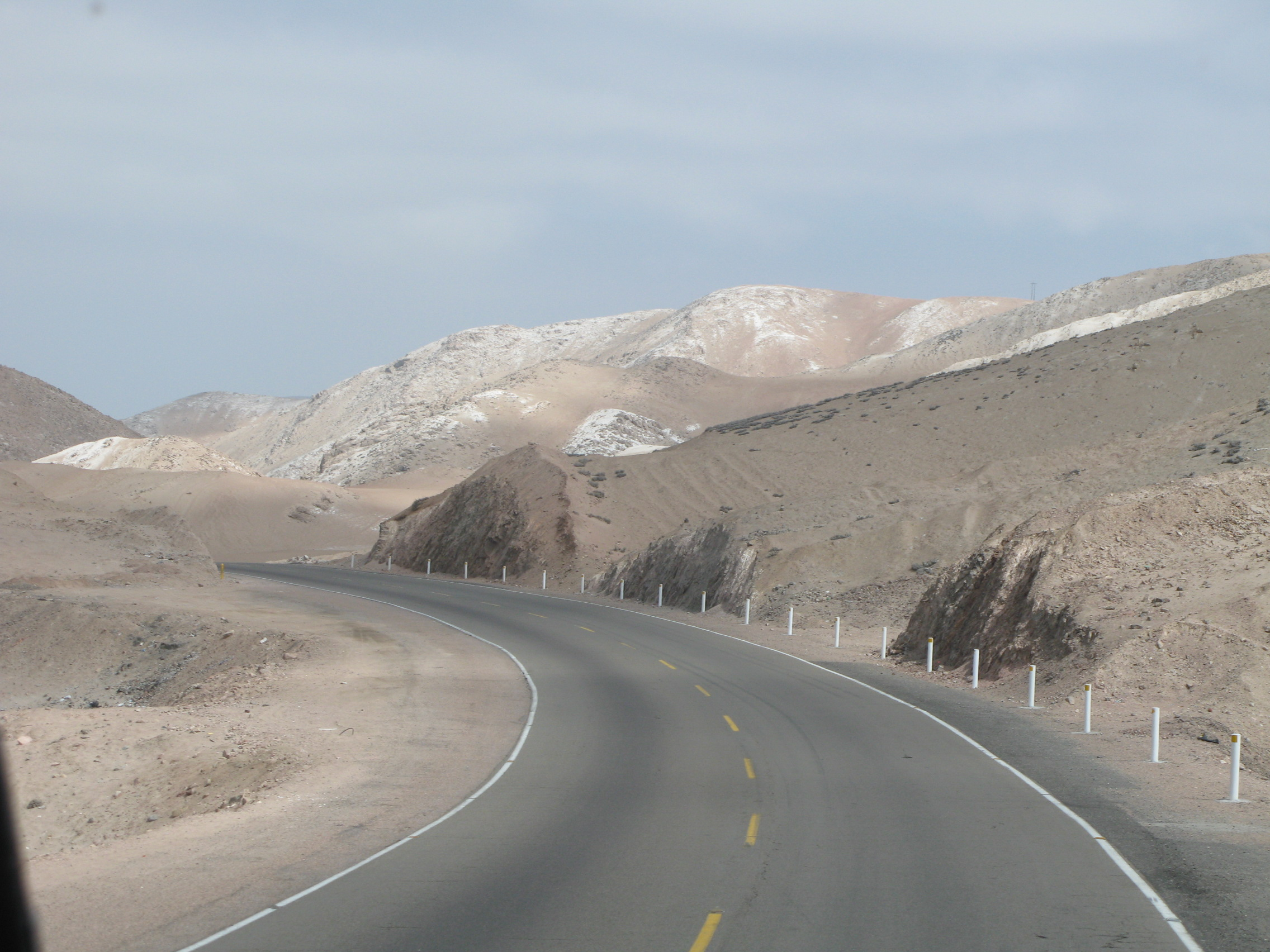 Puščava Atacama - vidna salinizacija - na poti proti Tihemu oceanu